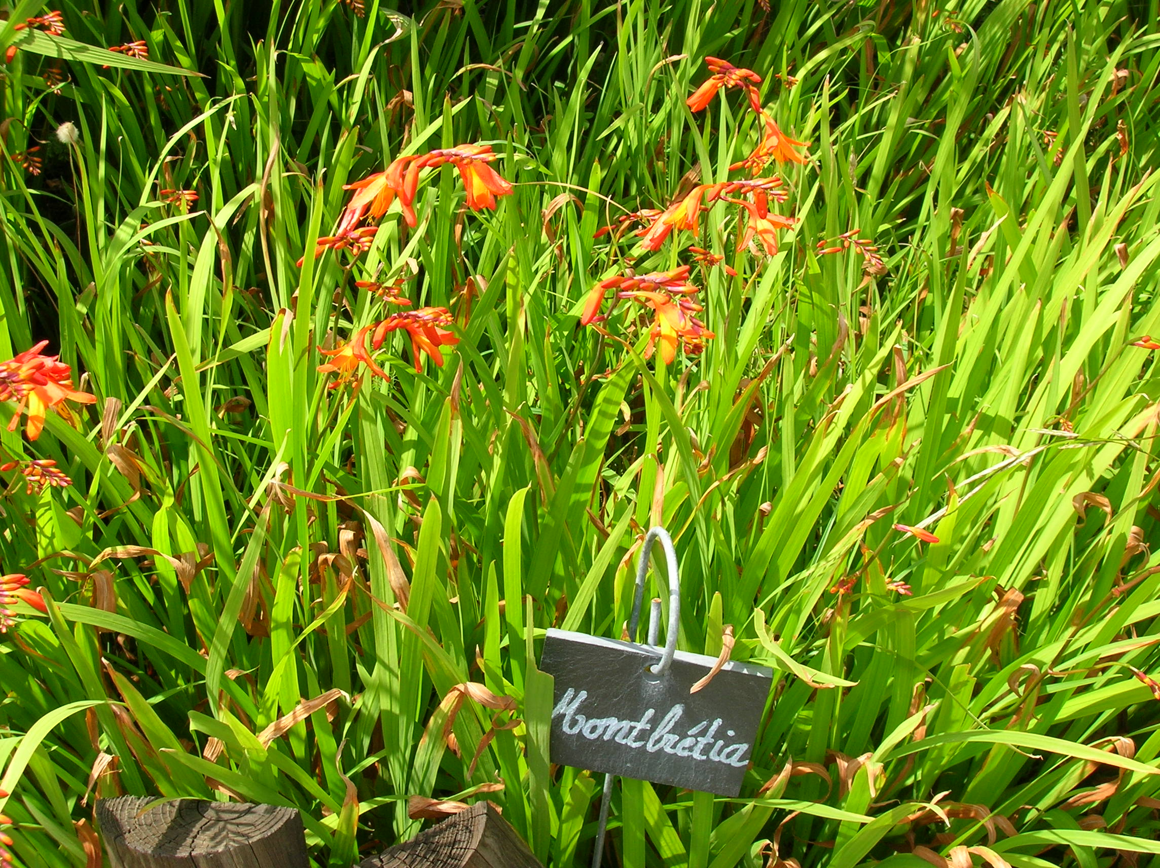 Iridaceae : Montbrétia